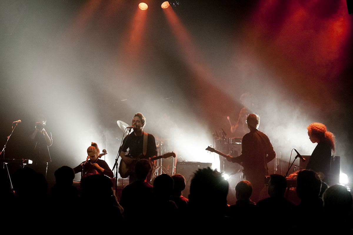 Choir of Young Believers på spillestedet Forbrændingen, Albertslund, 5. april 2012